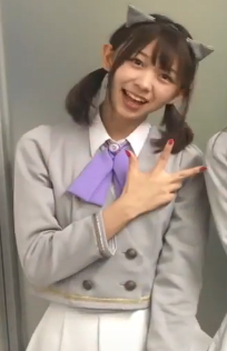 わーすたです。